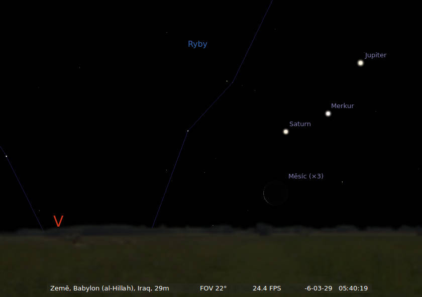 Exportovaný a upravený obrázek z programu Stellarium. Konjunkce Jupitera, Saturna, Měsíce, Merkuru a de facto i Slunce (neboť se jednalo o tzv. heliakální východ 29. března 7 př. n. l.). Podle rozšířené teorie pocházející od Johanna Keplera toto měla být Betlémská hvězda.